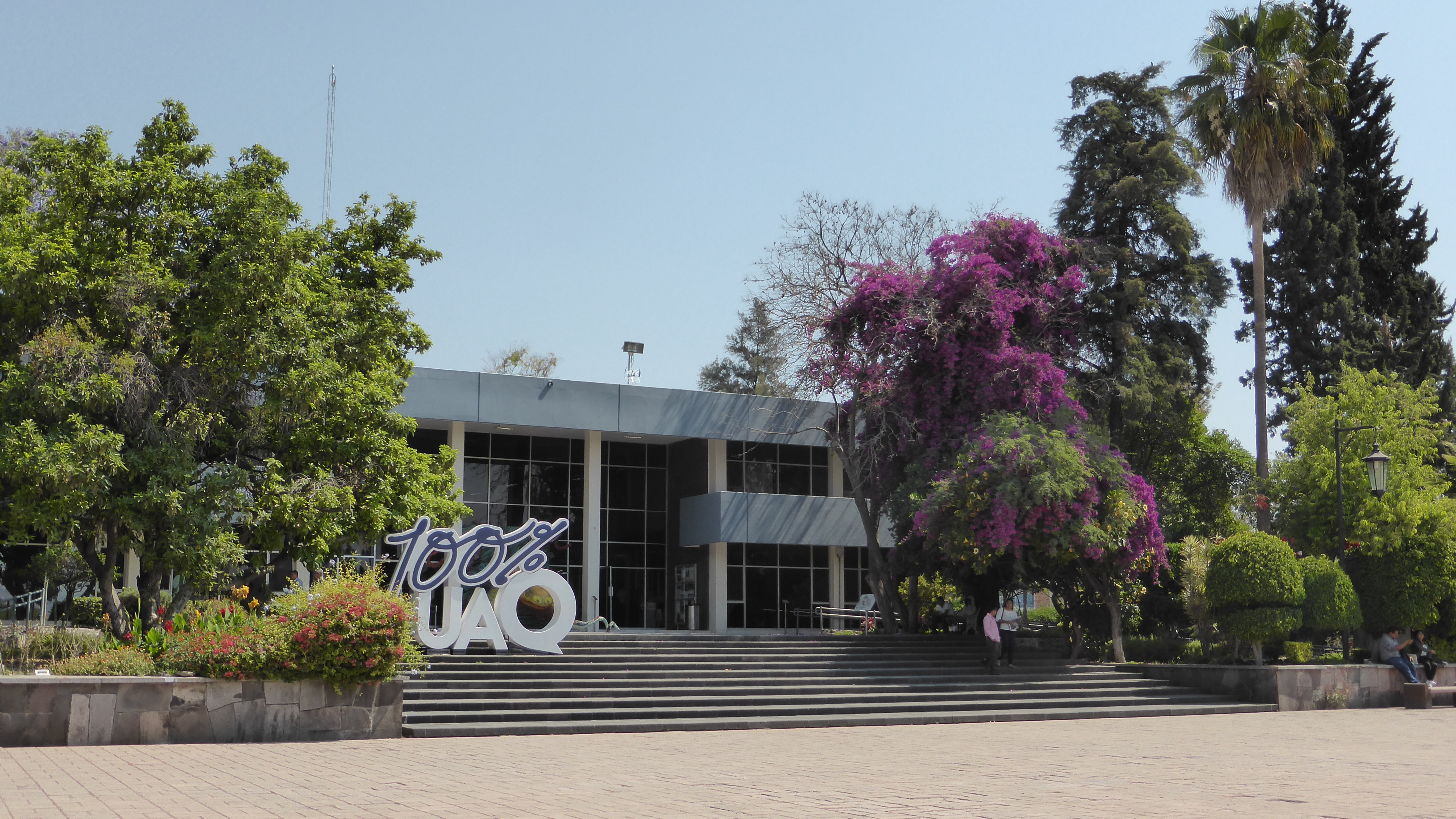 Rectoría de la Universidad Autónoma de Querétaro, ubicada en el Campus Central sobre el Cerro de Las Campanas en el municipio de Querétaro.